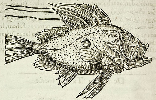 « Coq marin ». Illustration extraite du chapitre 19 de De piscibus marinis de Guillaume Rondelet